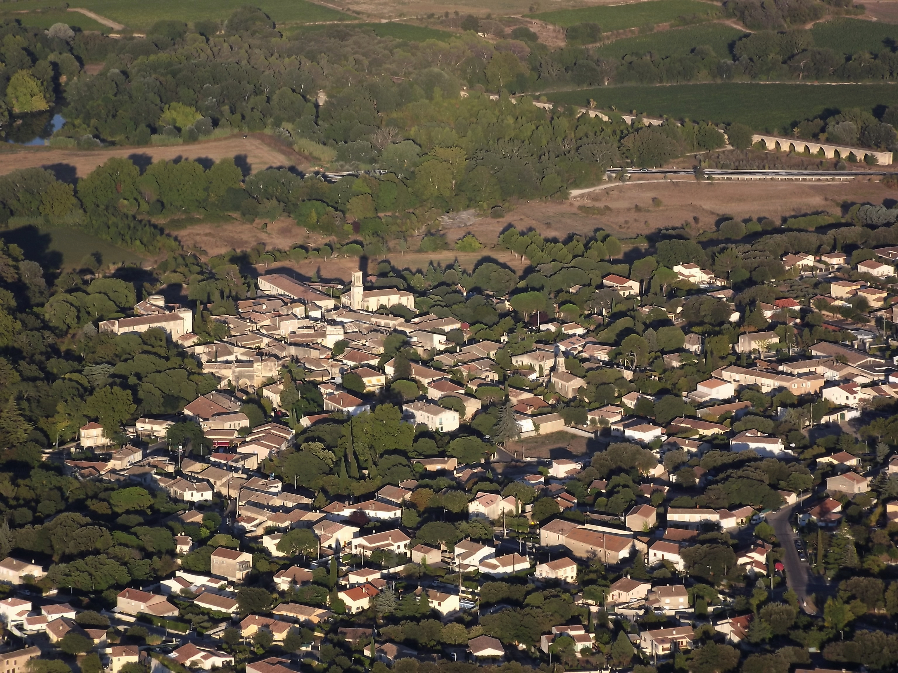 Vue aérienne